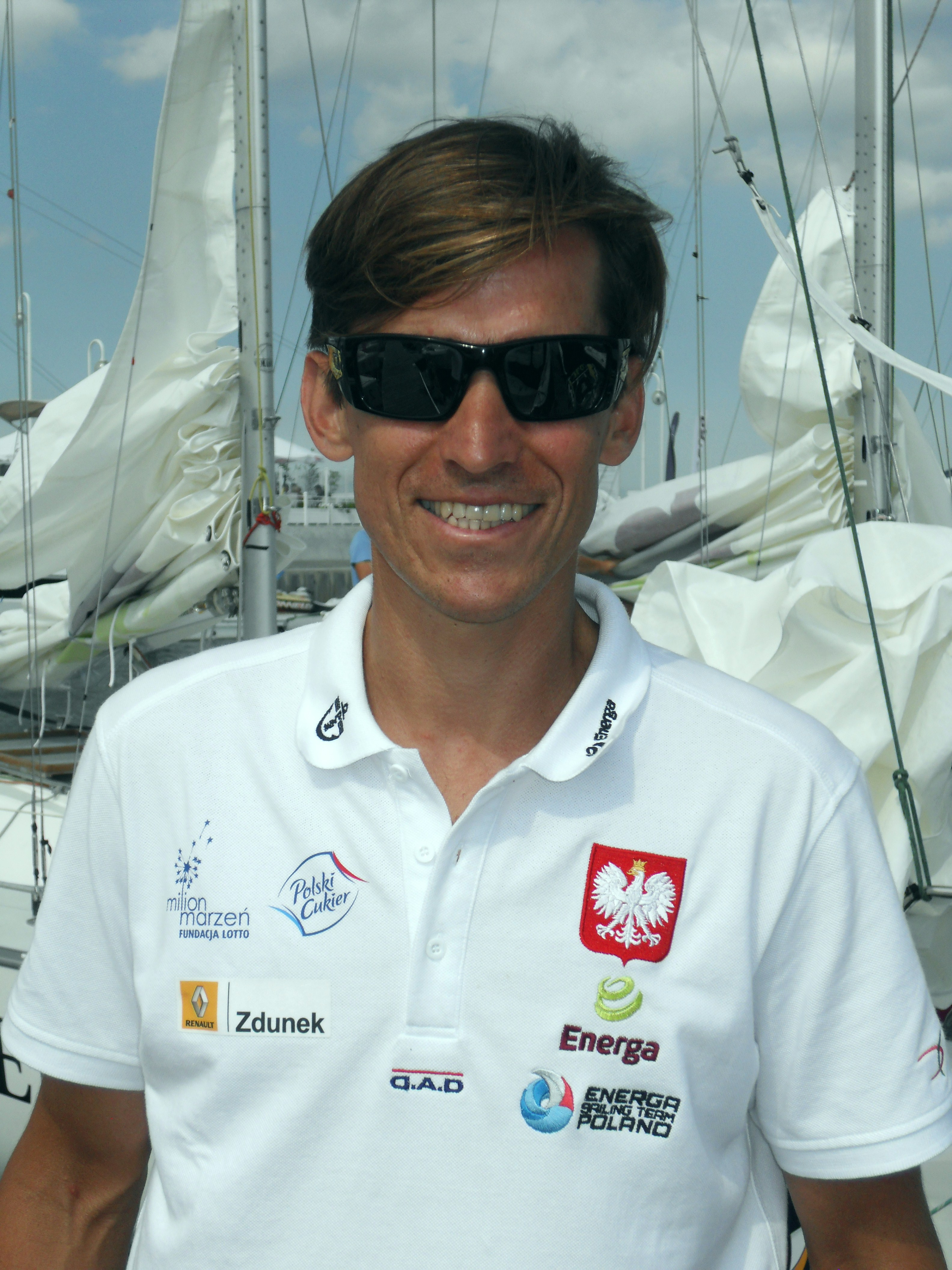 Piotr Myszka, żeglarz (reprezentant Polski w windsurfingu).